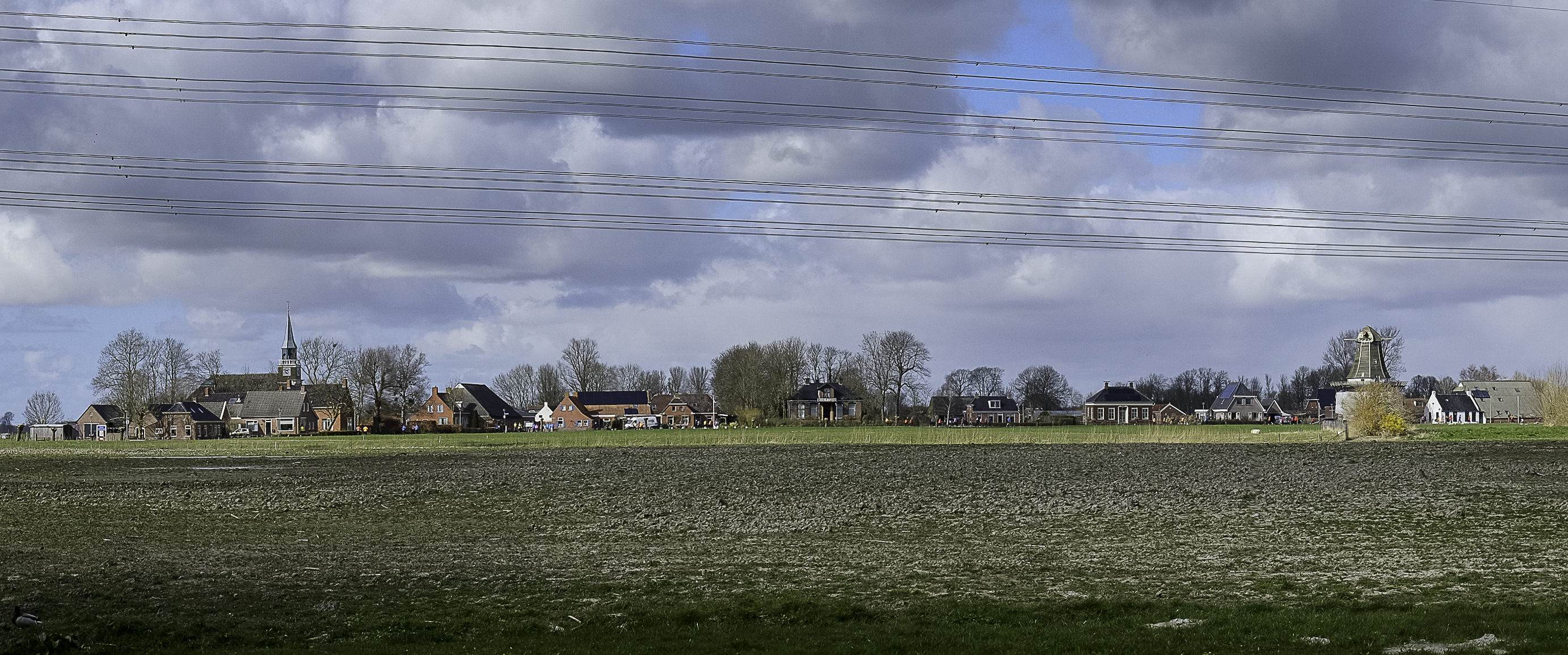 Silhouet van Klein-Wetsinge gezien vanaf Sauwerd